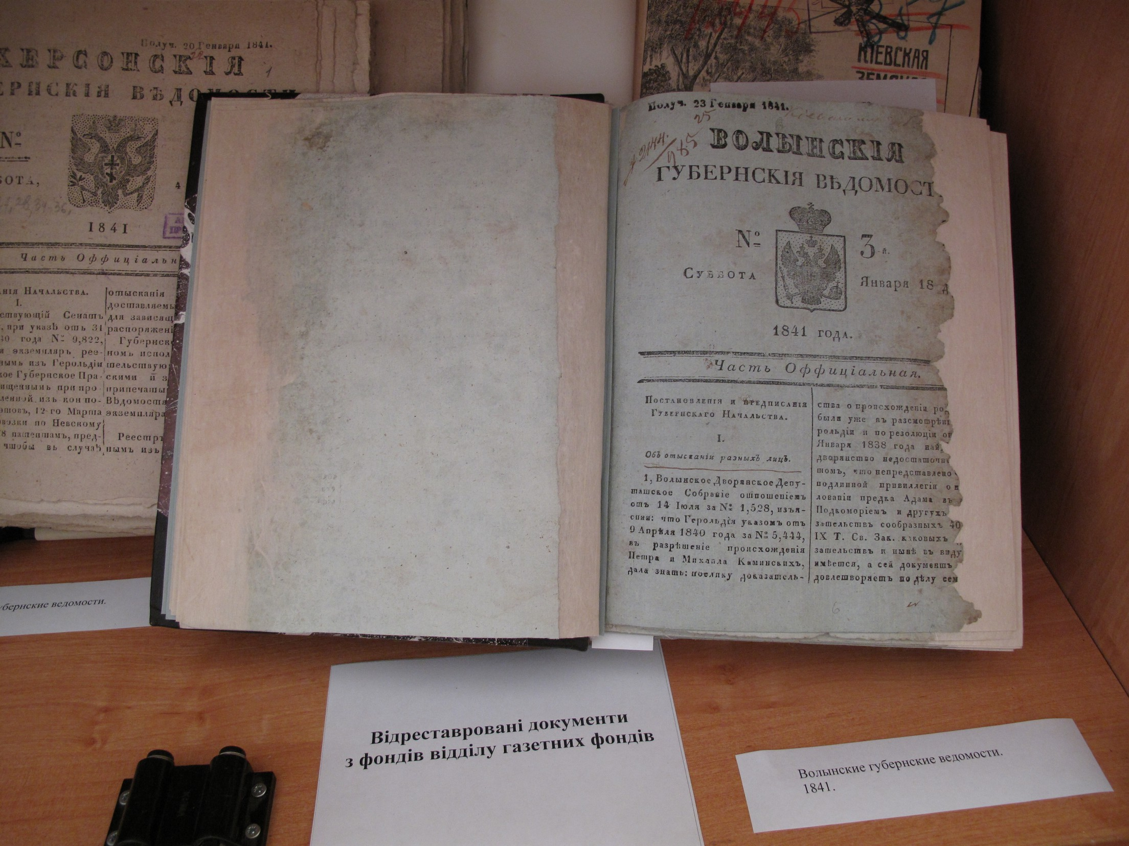 Реставроані видання НБУВ